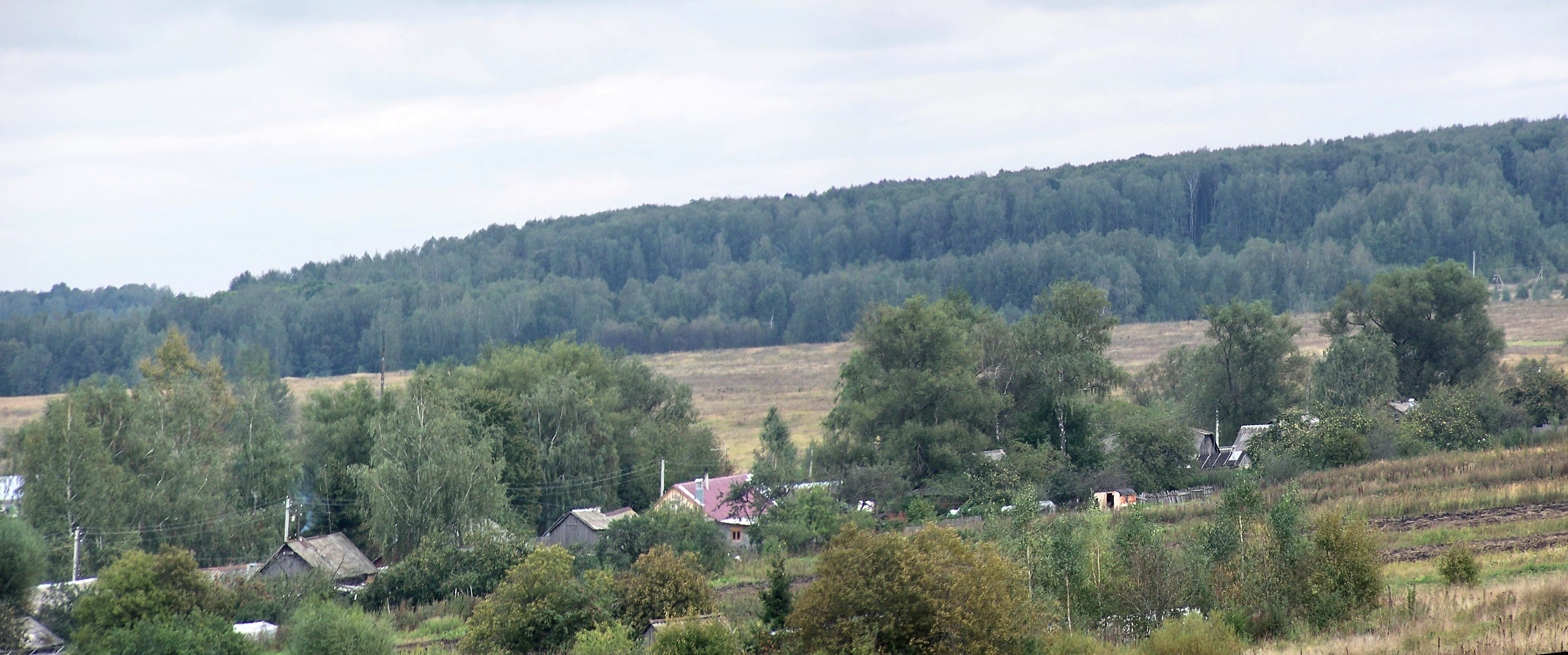 Тула. Южная окраина пос. Арсеньево. 18/09/2008г.